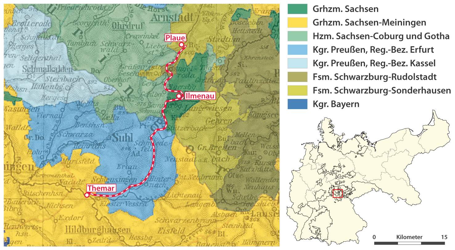 Karte vom Verlauf der Bahnstrecke Plaue–Themar durch die Thüringer Kleinstaaten